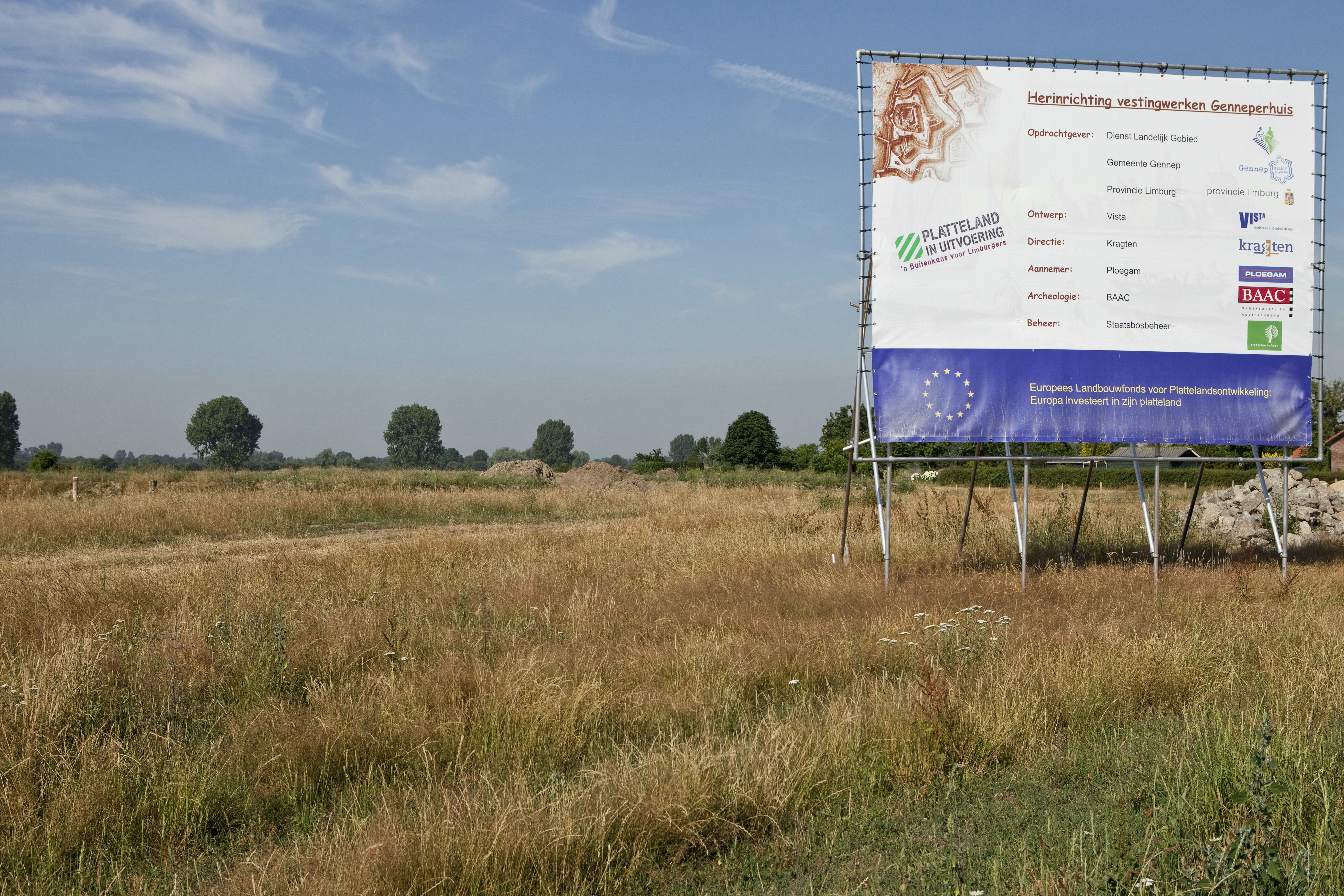 Genneperhuis: Overzicht van het landschap rond Genneperhuis - Informatiebord over de herinrichting van de vestingwerken Genneperhuis